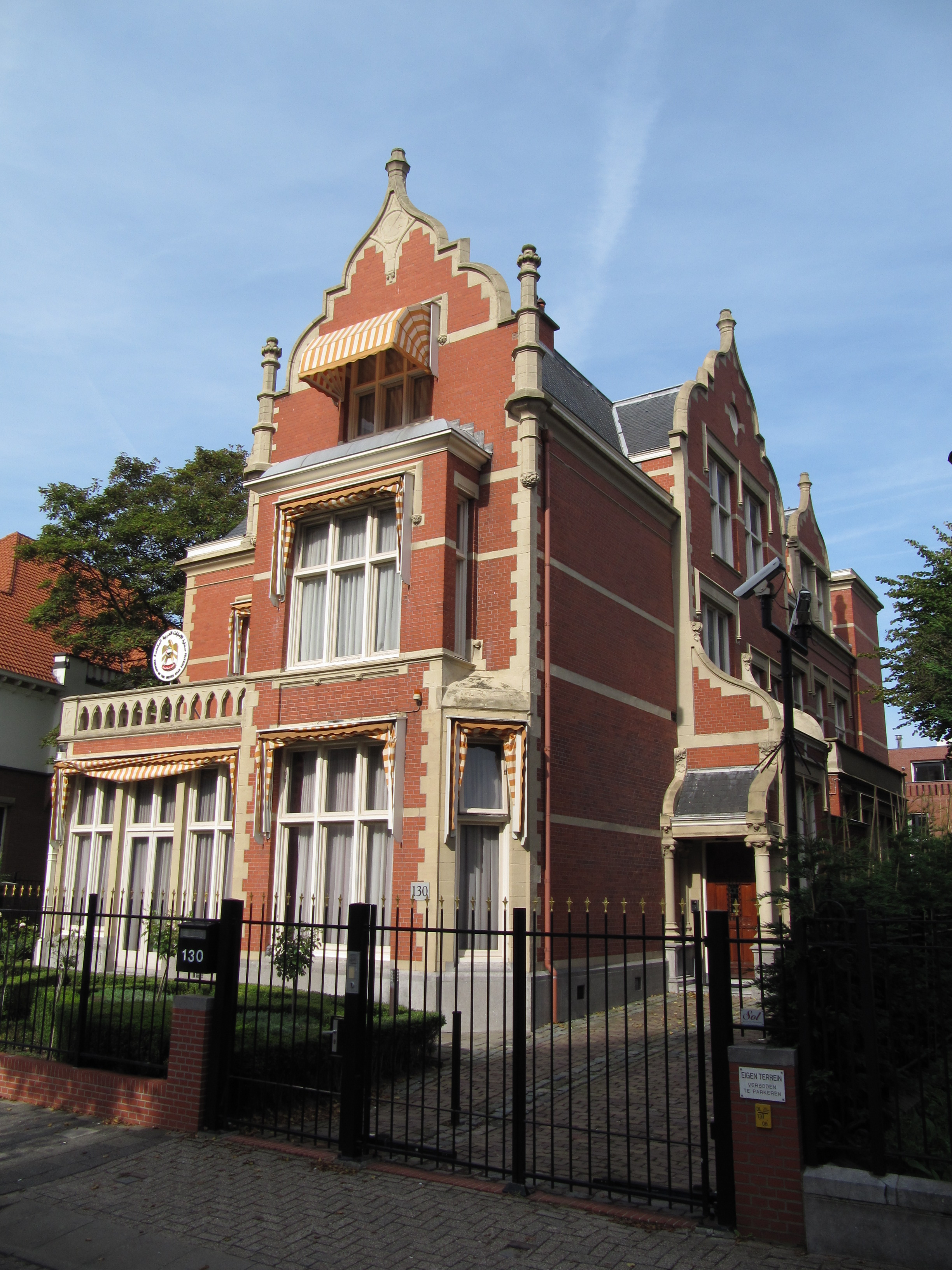 RM461427 Den Haag - Eisenhowerlaan 130.jpg